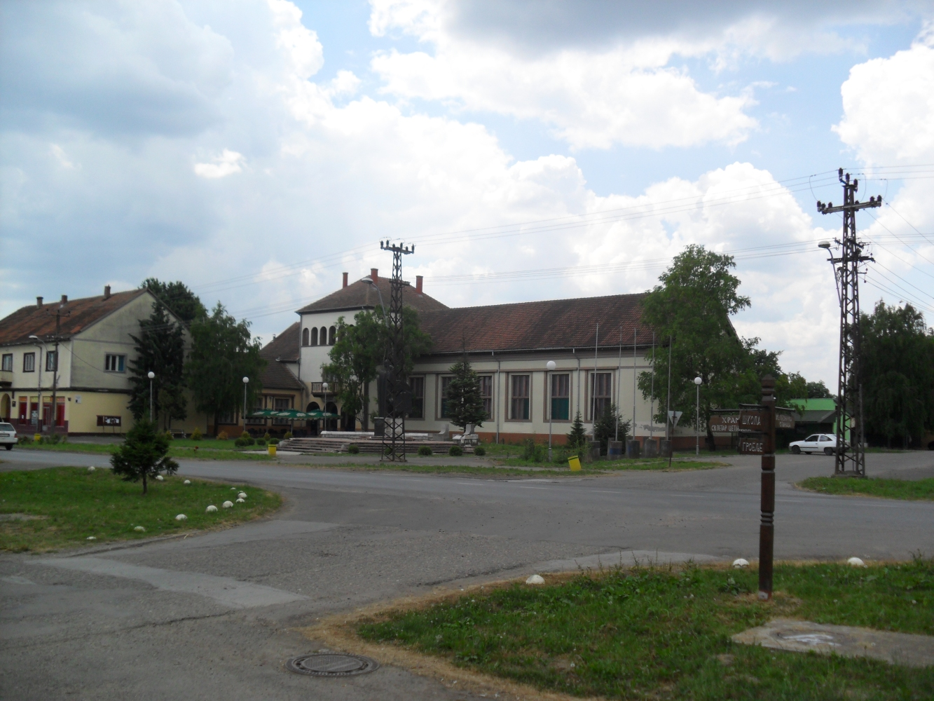 14.06.2011. _ Lovcenac